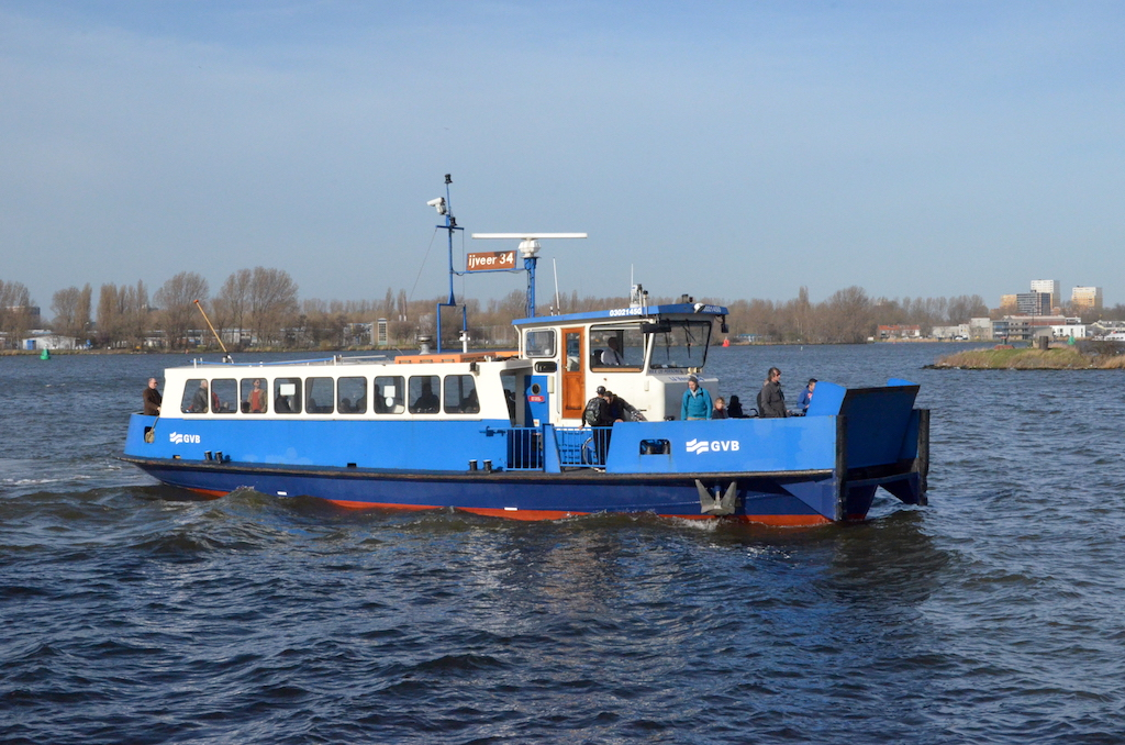 GVB IJveer 34 op het IJ. Foto: Erik Swierstra.